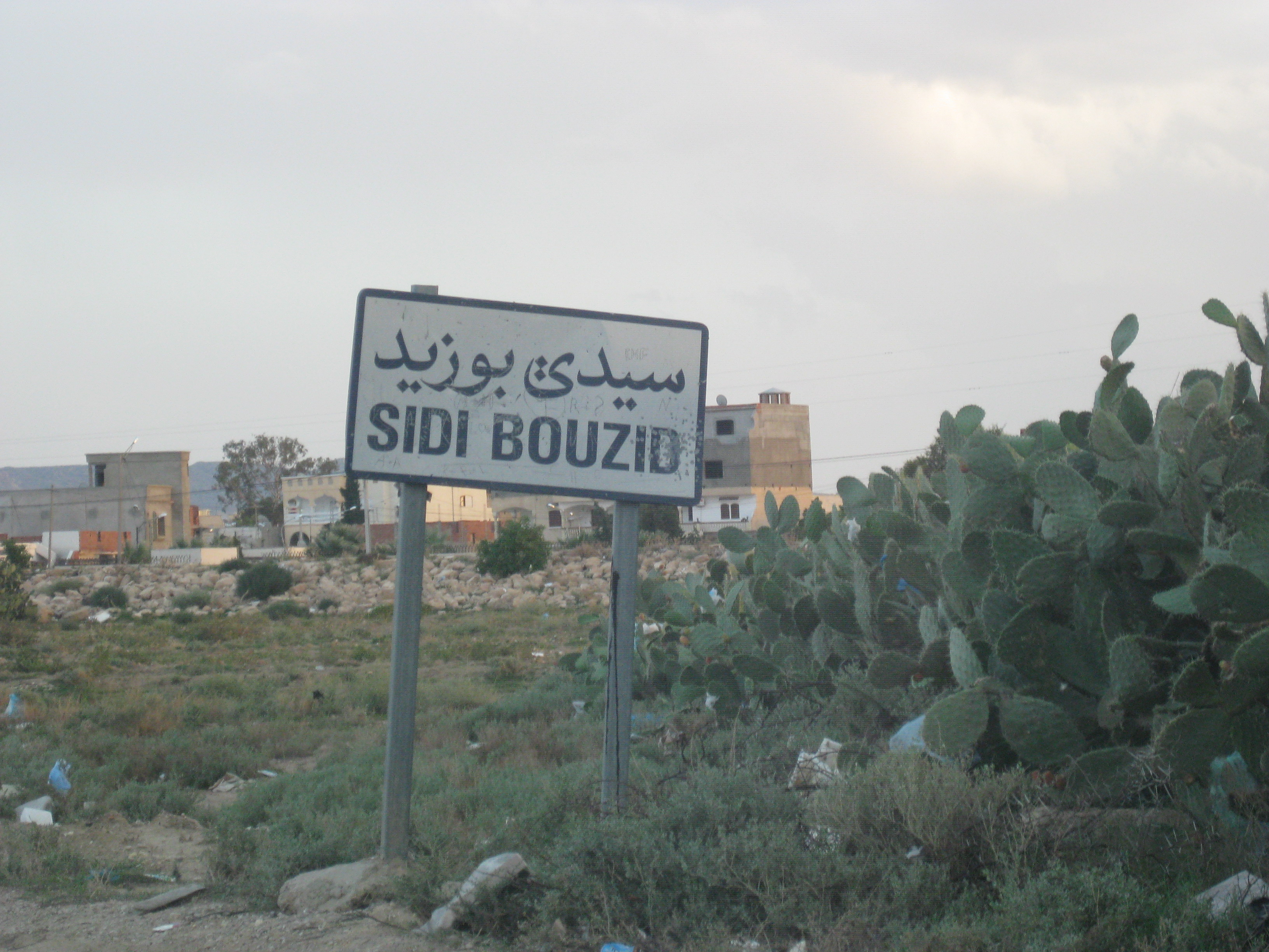 Sidi Bouzid, Tunisia